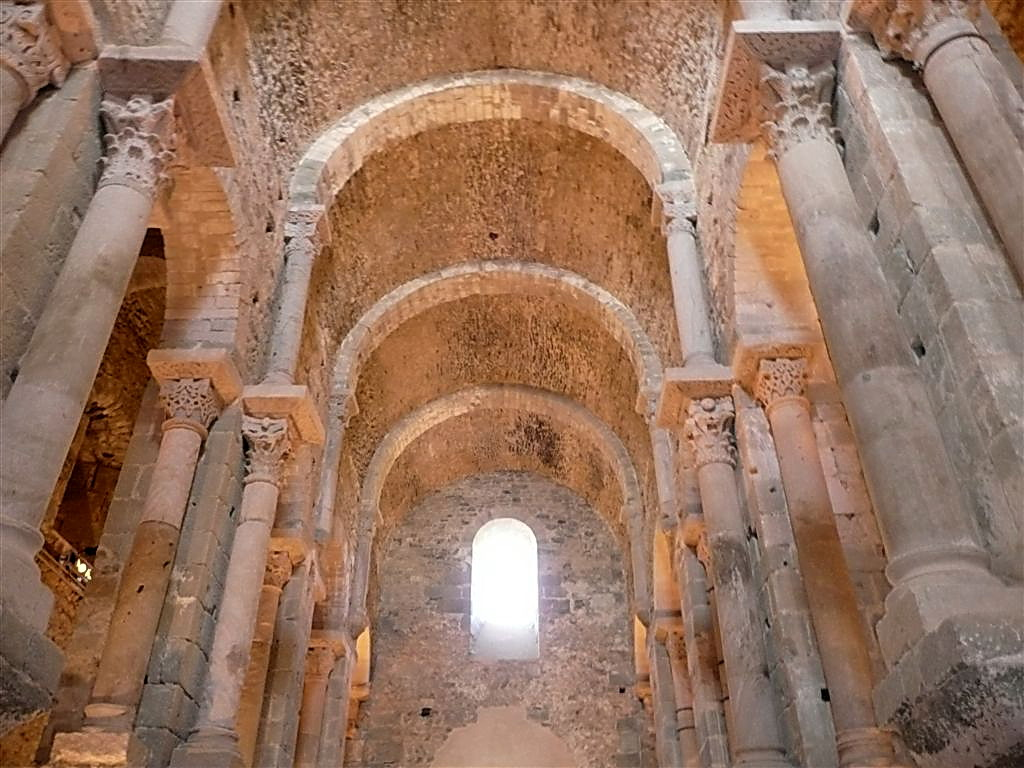 Monestir de Sant Pere de Rodes (el Port de la Selva, Alt Empordà, Catalunya). Volta de la nau central de l'església (vers la façana)